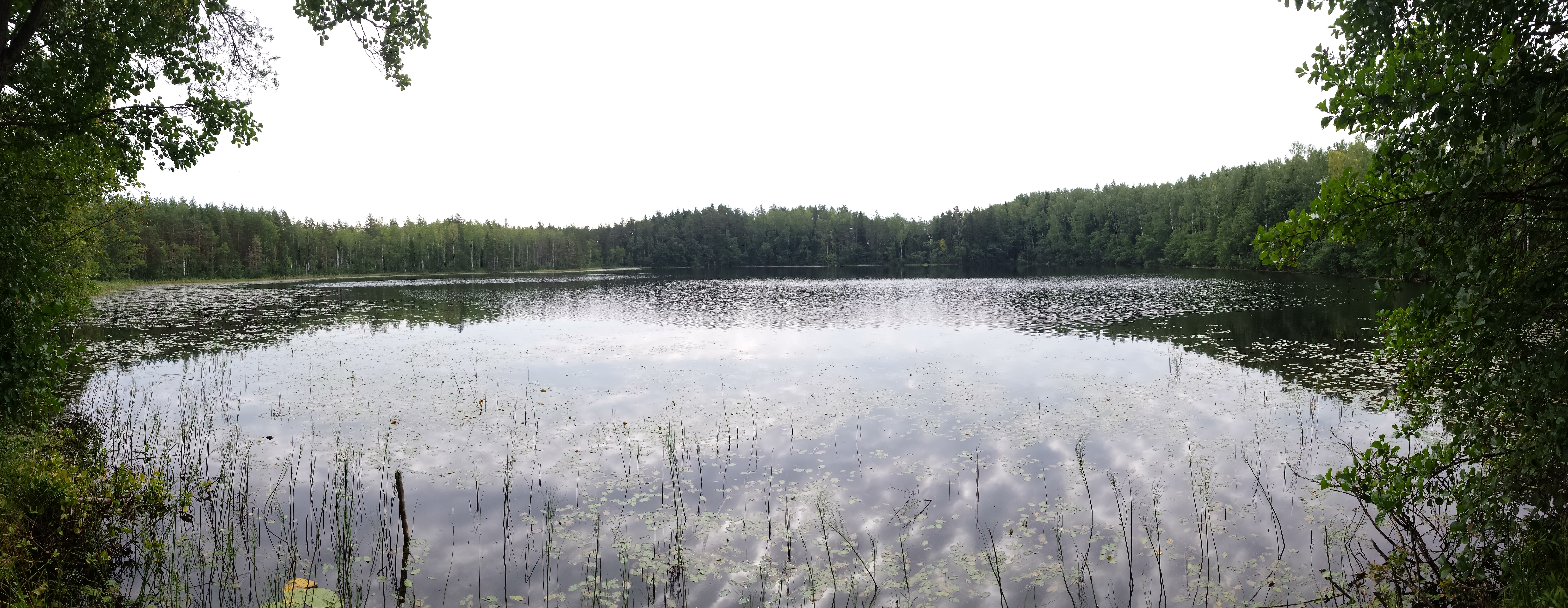 Jussi Väinjärve põhjakallas